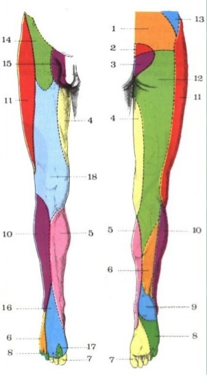 Territorios sensitivos del miembro inferior